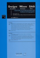 Zeitschrift Erwägen Wissen Ethik / Deliberation Knowledge Ethics